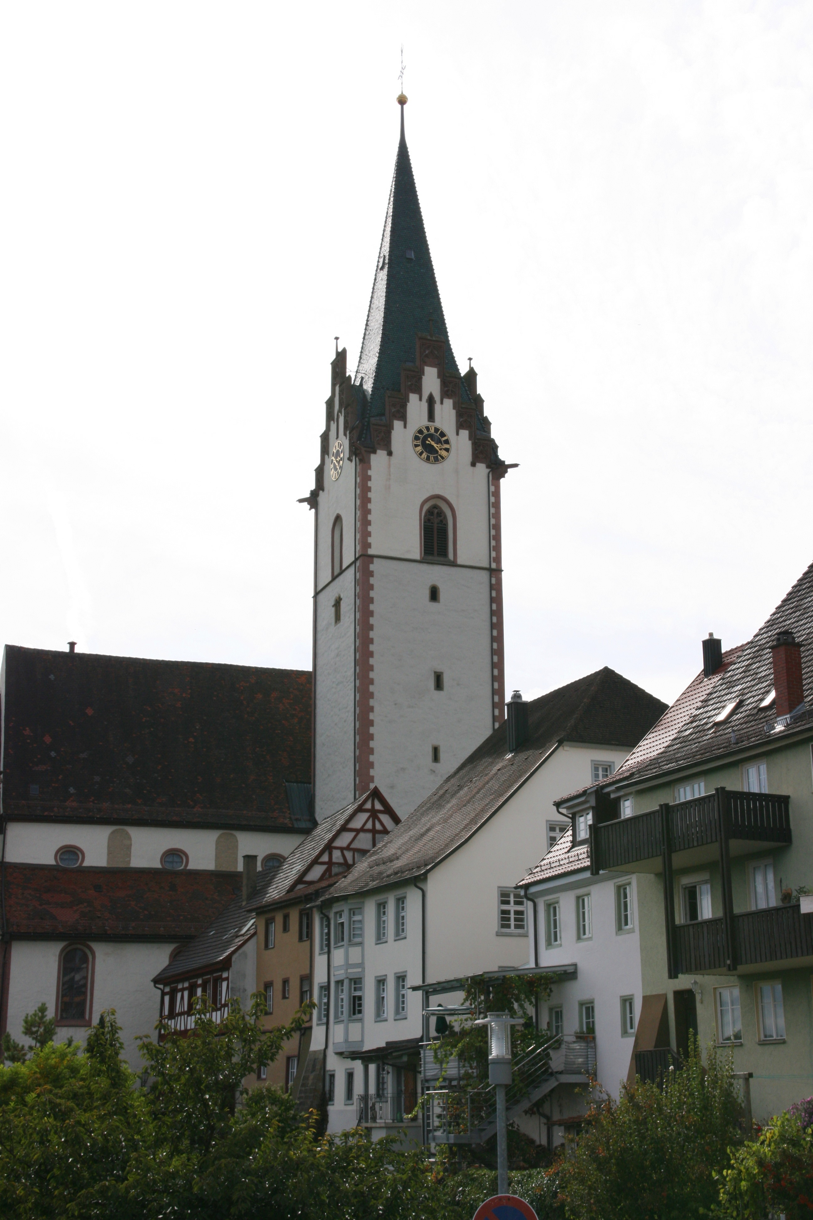 Engen, Blick von Am Maxenbuck